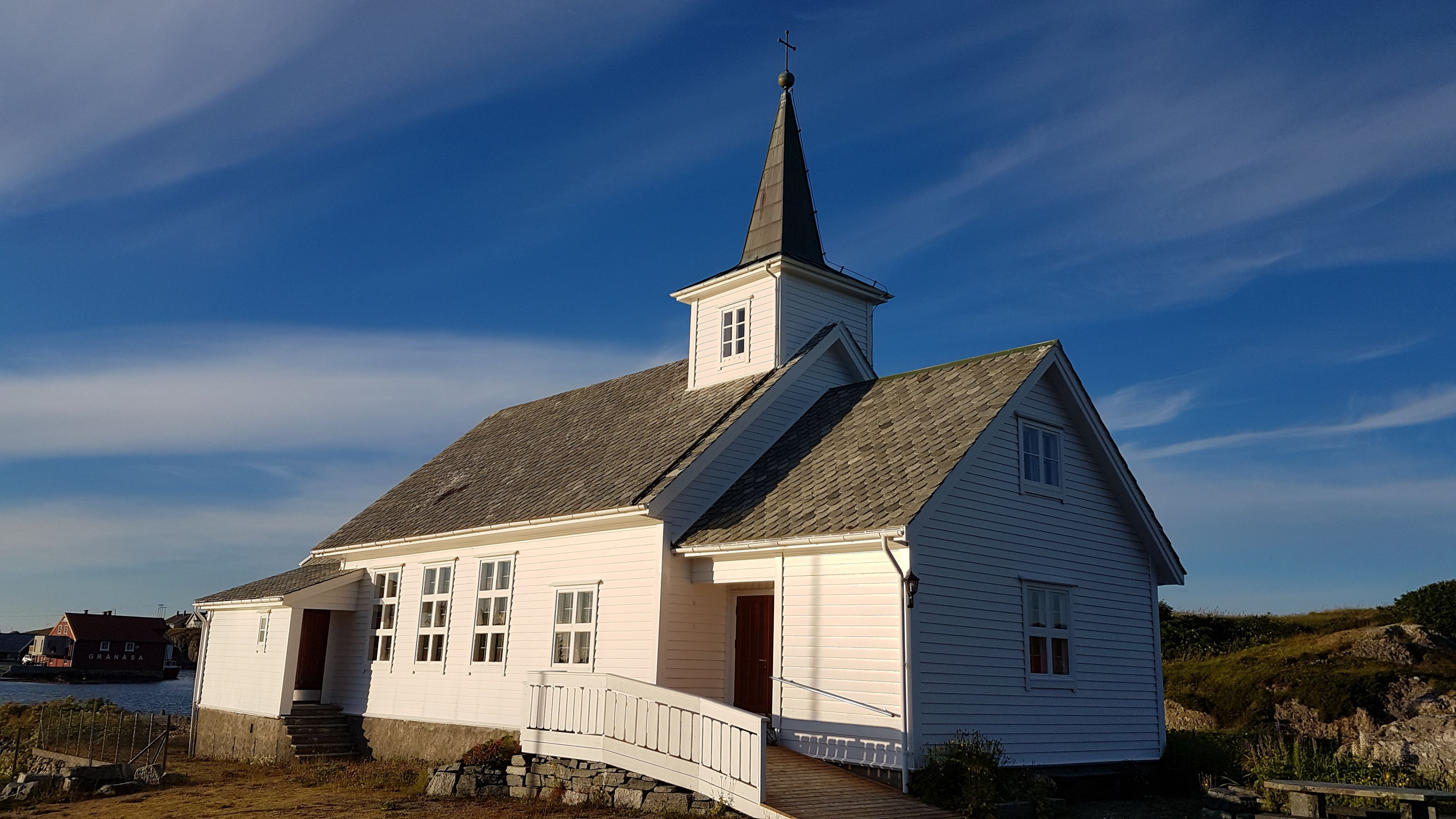 Bulandet bedehuskapell. Foto: Roger Grimelid/Riksantikvaren.